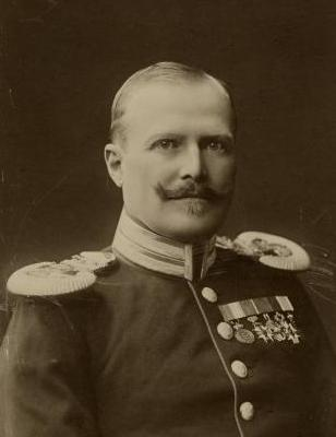 Adlerstråhle, Ernest Hjalmar Leonard, born 1870, deceased June 15, 1811. Kapten. I Kongostatens tjänst 1896-98. Kapten i Kongostatens armé. Svea Livgarde.